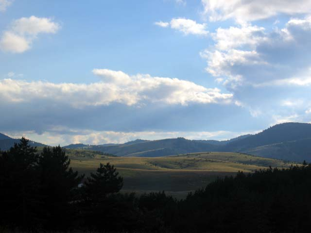 Description:Природне лепоте Златибора author: Snezana Trifunovic Source: self-made